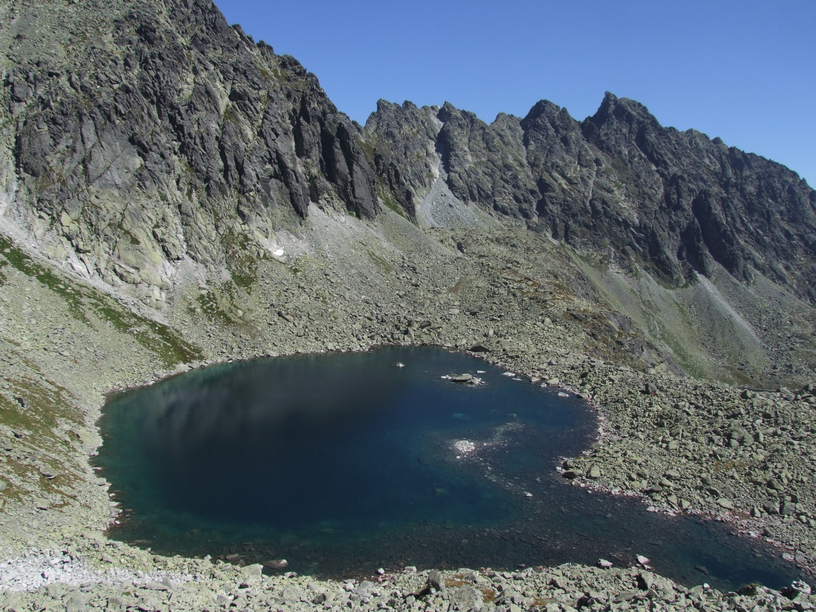 Capi Staw w Dolinie Młynickiej (Tatry Wysokie)